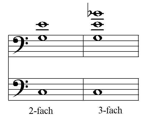 Beispiel eines Basszink (Orgel).